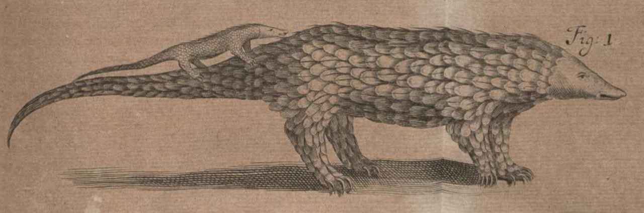 Illustration